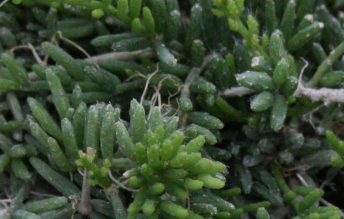 Rhipsalis mesembryanthemum rövidhajtásai